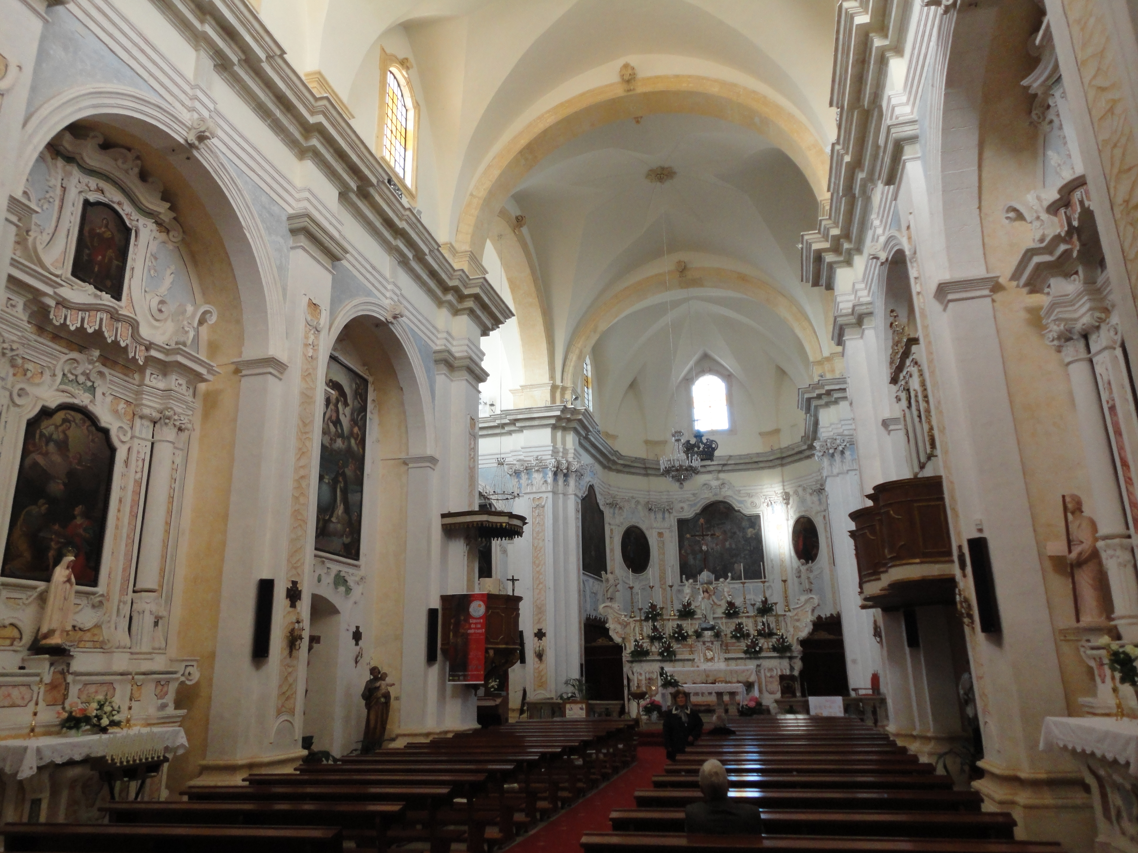 Chiesa Madre di Diso Interno, Lecce